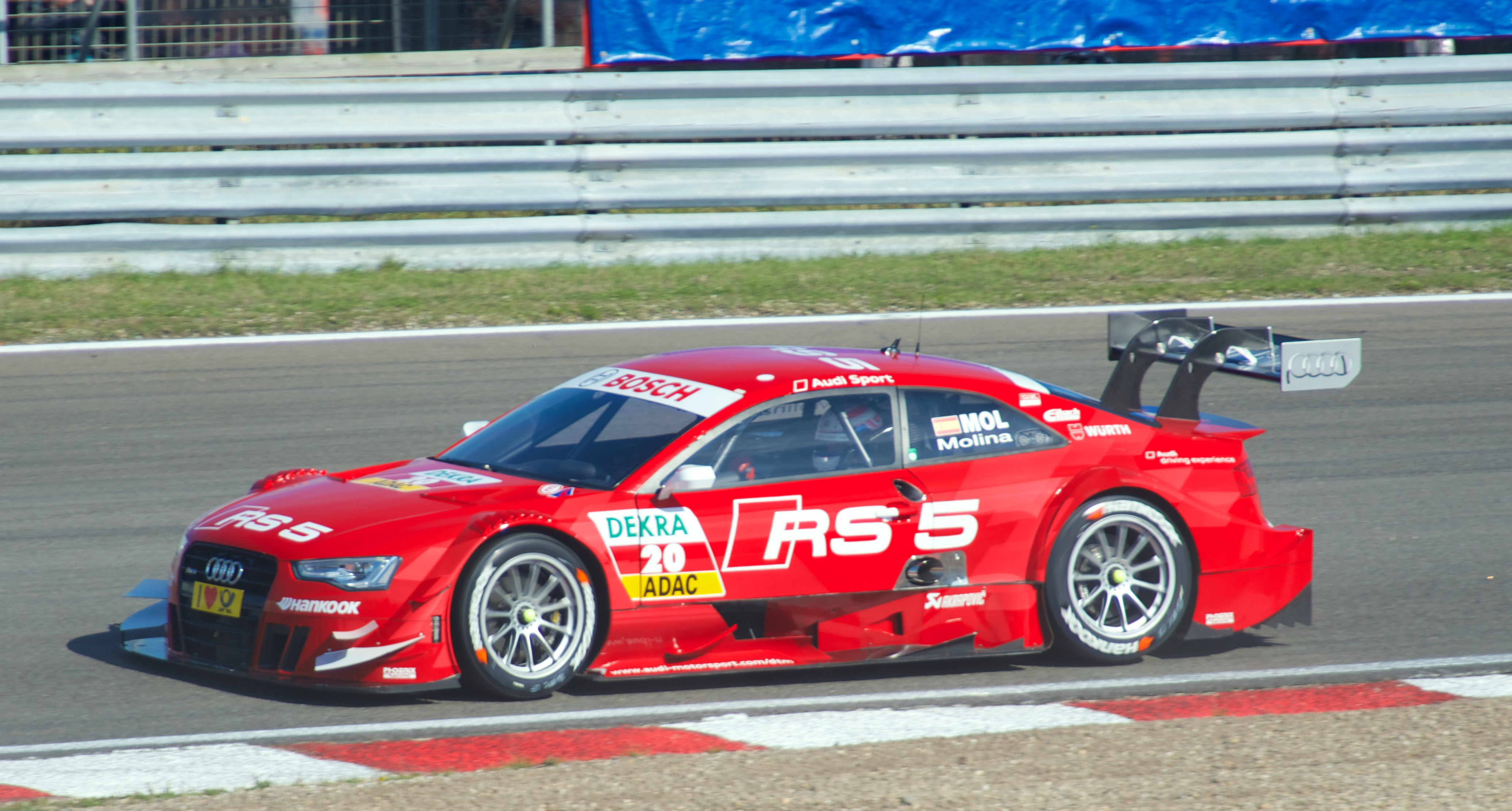 Miguel Molina driving an Audi A5 DTM (R17) at 2013 DTM Zandvoort